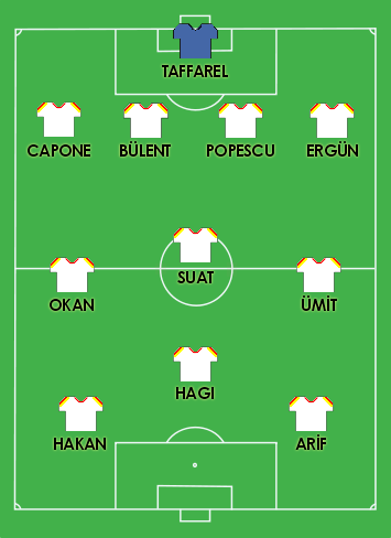 Galatasaray lineup, Galatasaray SK vs. Arsenal FC, 17 May 2000, UEFA Cup Final